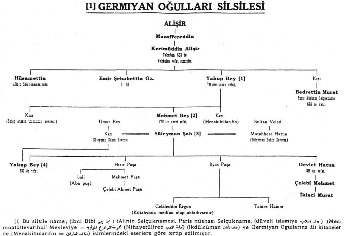 Germiyanoğulları Silsilesi